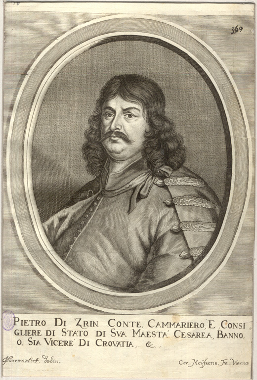 Zrínyi Péter portréja. Cornelis Meyssens rézmetszete